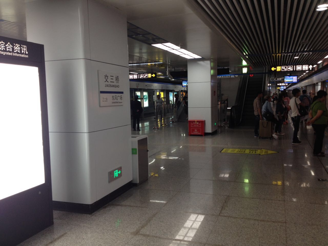 昆明地铁2号线交三桥站。